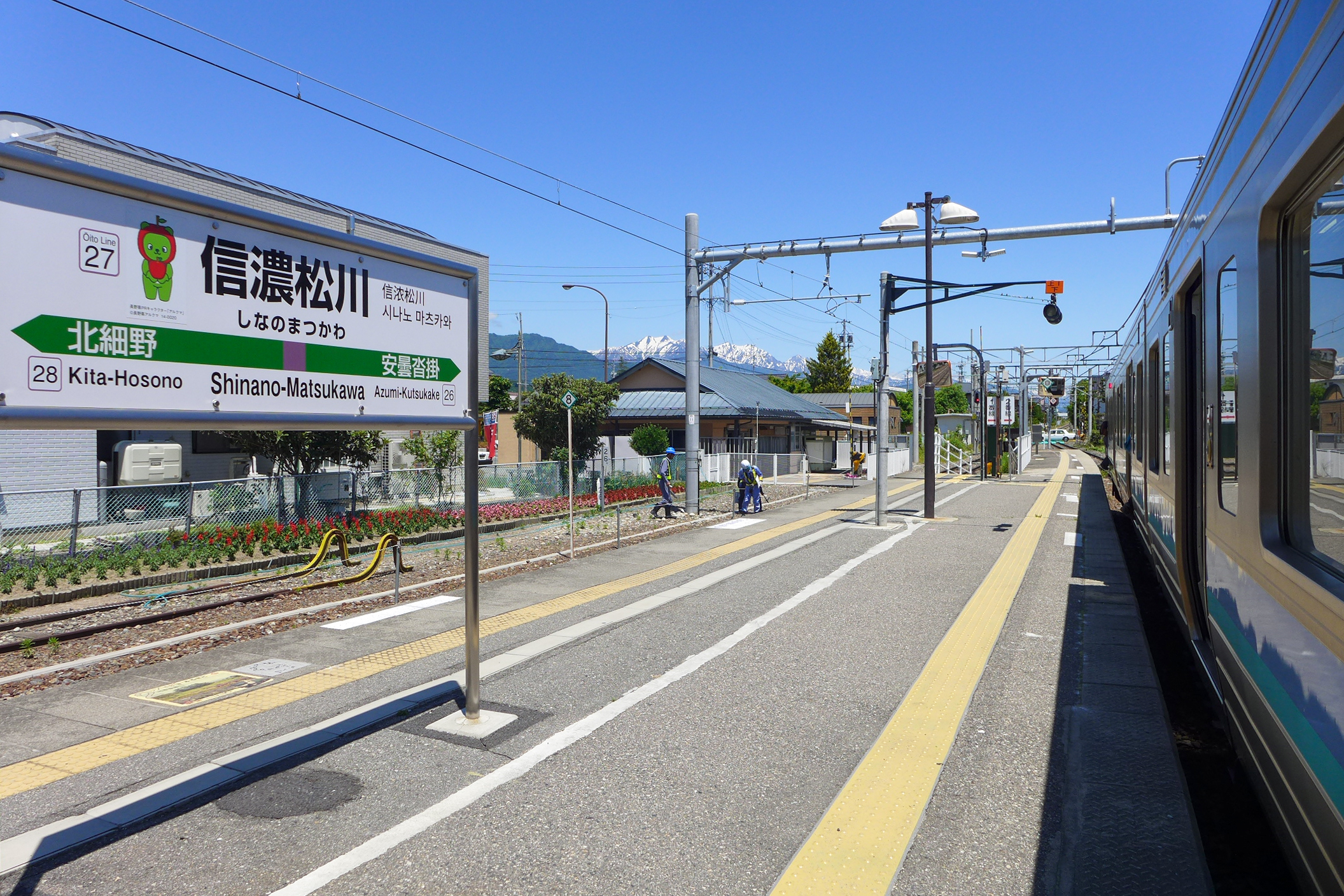 Shinano-Matsukawa Station